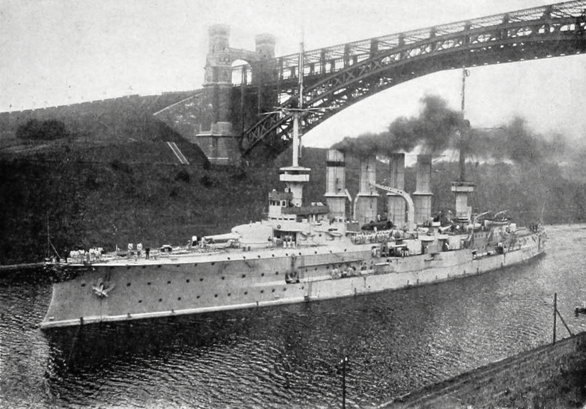 En.wiki sayfasında Commons'a taşınması için işaretlenmiş, lisansı uygun.